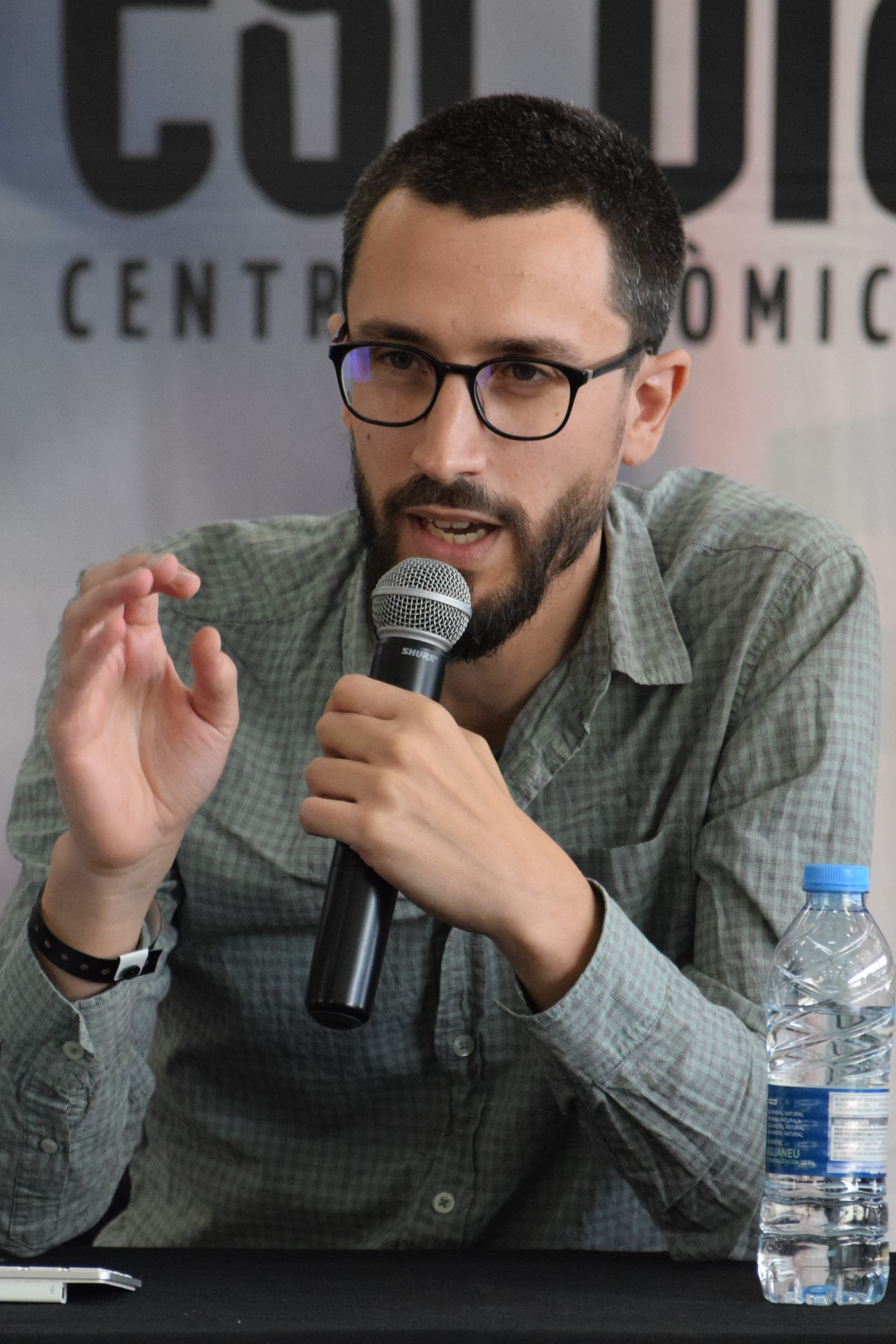 El dibuixant català Javi Rey, proclamat autor revelació pel seu còmic Intemperie, impartint una classe magistral durant el Saló Internacional del Còmic de Barcelona de 2017. Divendres 31 de març de 2017.